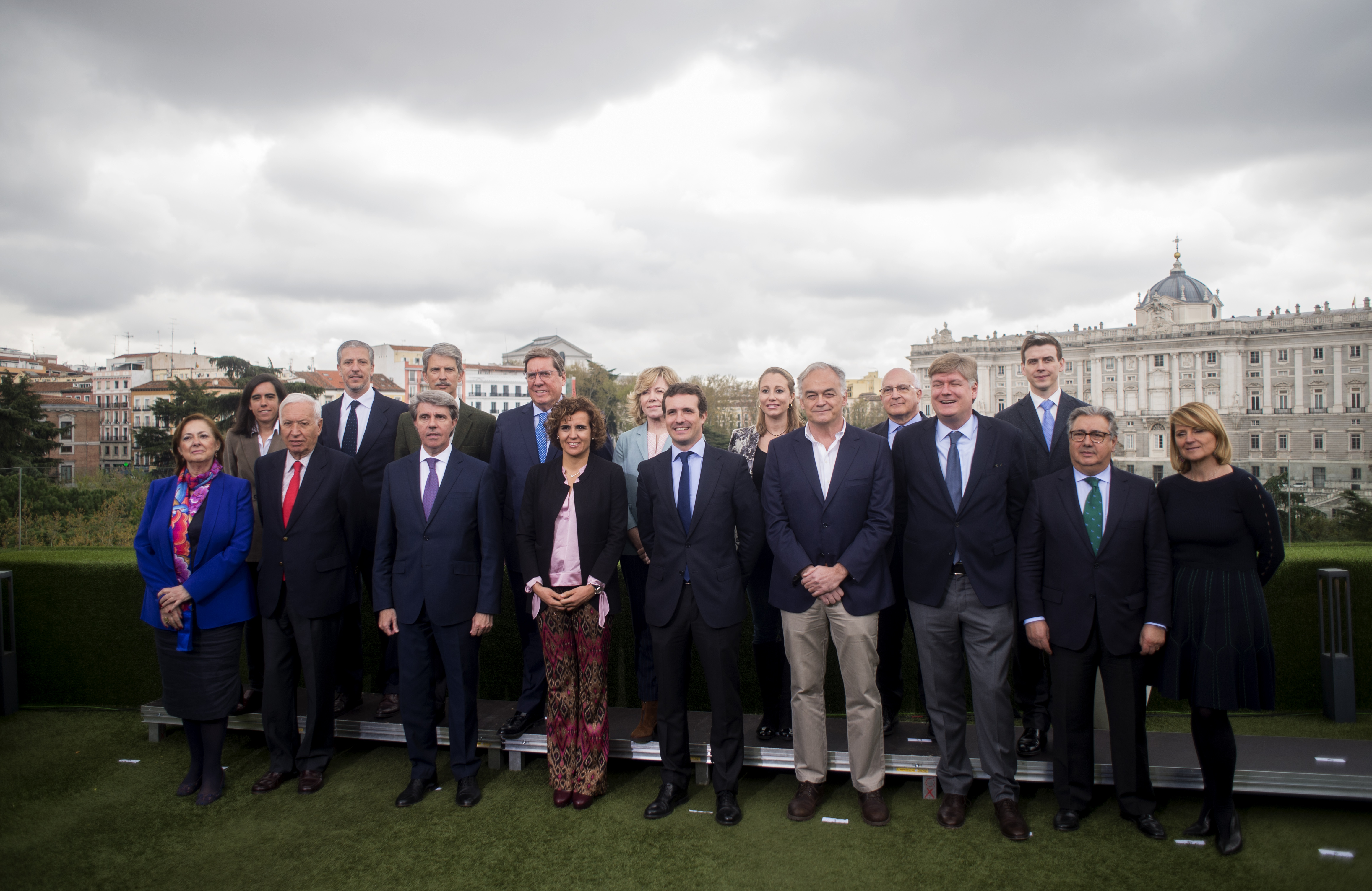 _SAM9166